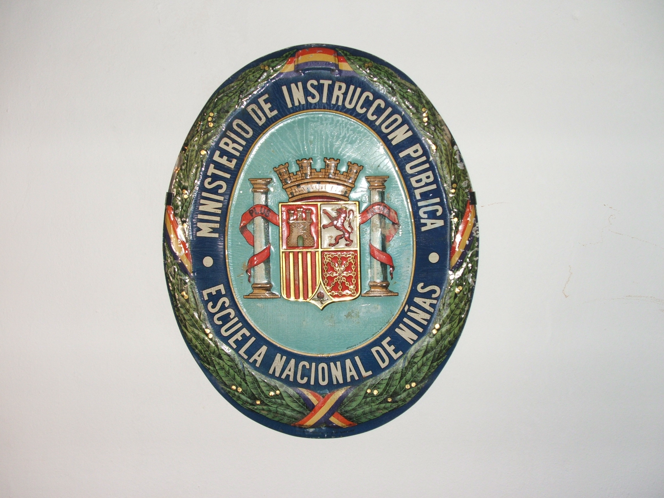 Escudo de un colegio de niñas de la II República española. Fotografiado en el museo etnográfico de Vélez Rubio, Almería (España).